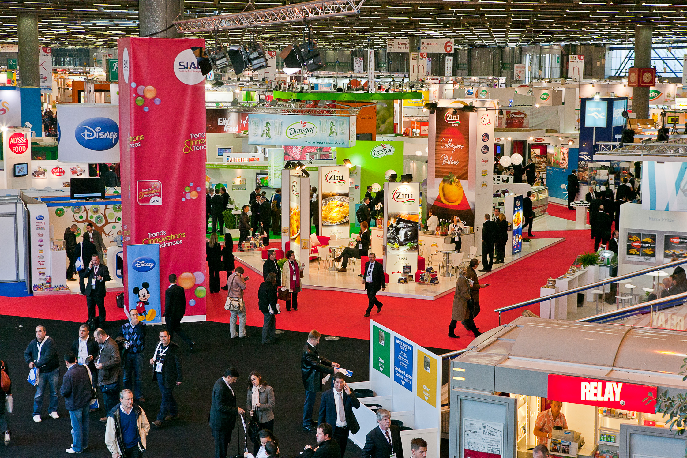 Une vue du salon SIAL Paris, de ses exposants et ses visiteurs lors de l'édition 2010.